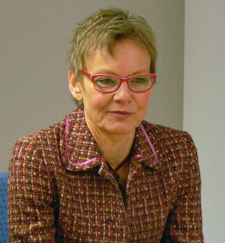 Die brandenburgische Wissenschaftsministerin Sabine Kunst bei der Inbetriebnahme des Supercomputers HLRN-III in der Leibniz Universität Hannover bei einer Pressekonferenz